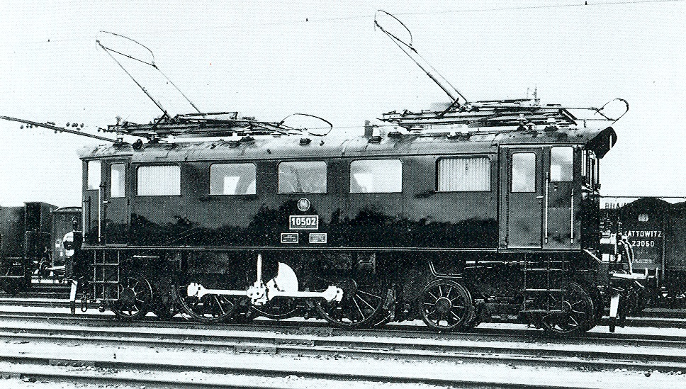 Werkfoto der AEG über die ES 2